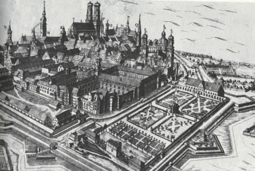 Ansicht der Residenzstadt München mit Blick auf die Residenz